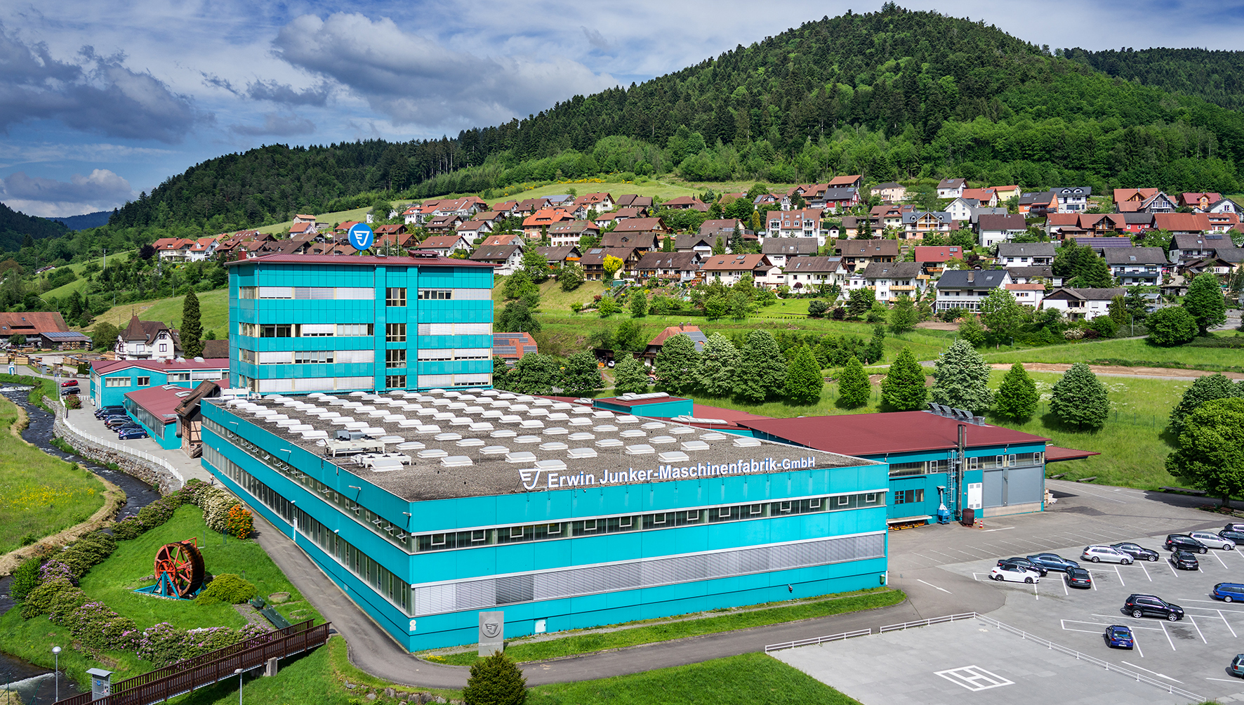 Junker Standort Nordrach 2016